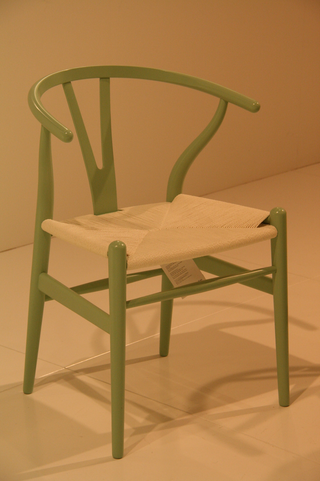 Hans J. Wegner's Y chair at Salone del Mobile Milano 2010